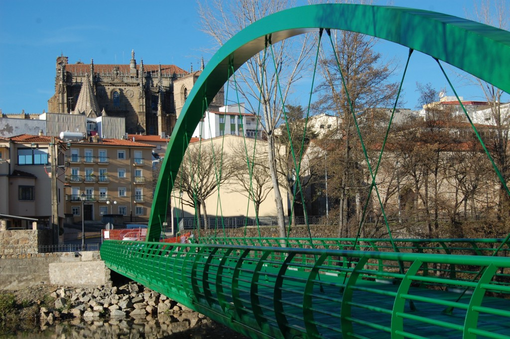 Puente construido recientemente en el barrio de San Juan en Plasencia (Cáceres) Dando paso al barrio de San Juan con el Cachon. Rio jerte.